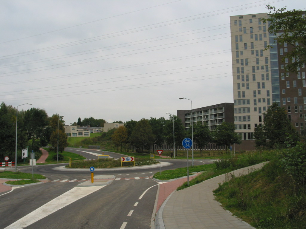 13-9-2007 Uitzicht op de rotonde op de einsteinstraat, Landgraaf De hoge flat Altitudo is inmiddels voltooid